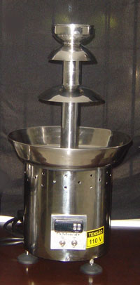 Cascata média sem chocolate